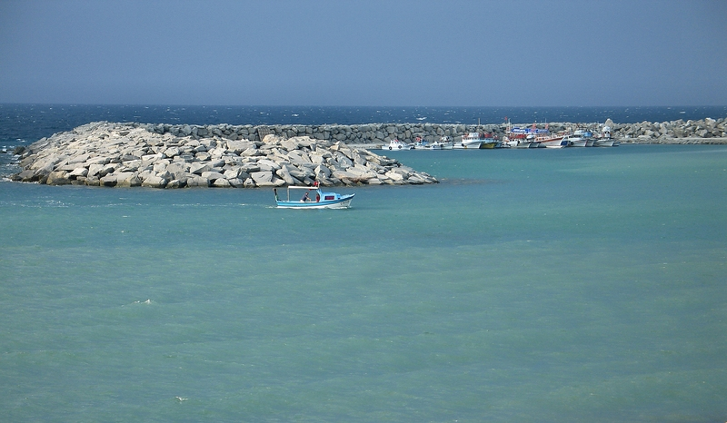 Gokceada